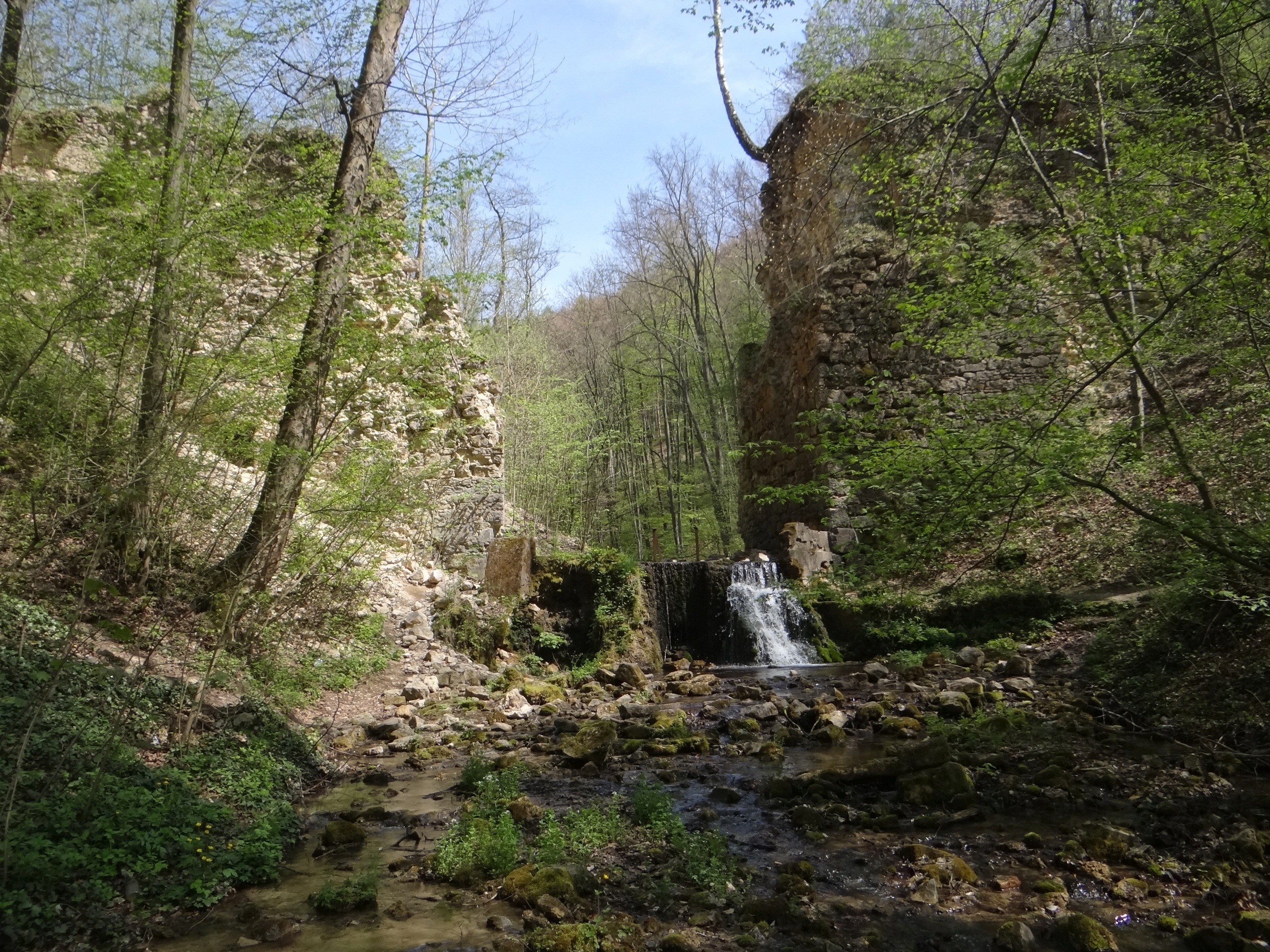 Rezerwat przyrody Dolina Eliaszówki. Diabelski Most